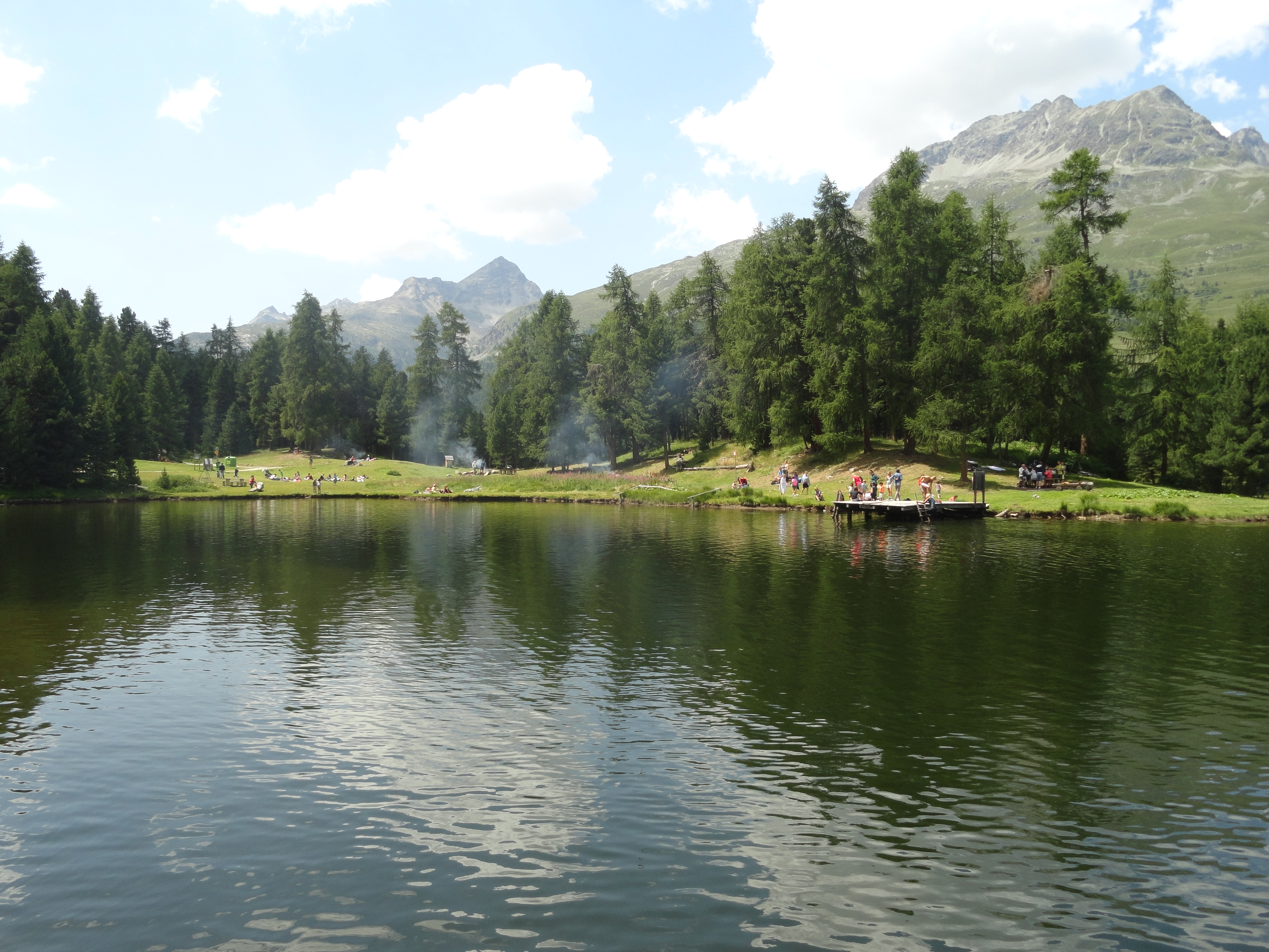 Lej Marsch